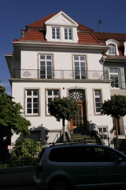 Haus Krahn in Bremen, Lüder-von-Bentheim-Straße 51Das abgebildete Objekt ist ein geschütztes Kulturdenkmal in der Freien Hansestadt Bremen, mit der Nr. 0849 beim Landesamt für Denkmalpflege registriert.